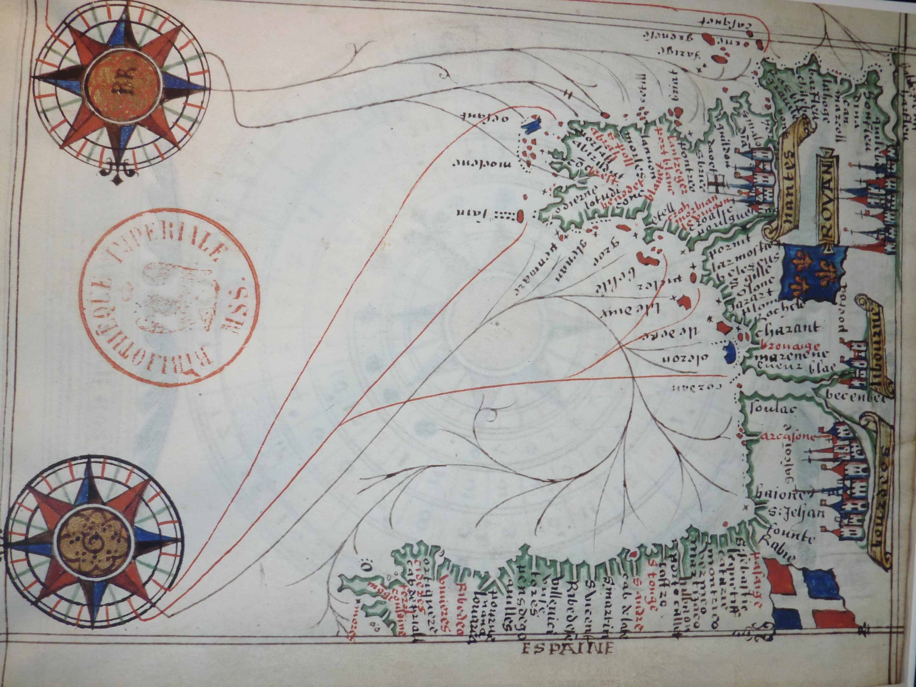 Portulan de Guillaume Brouscon (1548). Premier "faiseur de cartes" de l'école d'hydrographie du Conquet, Guillaume Brouscon rédige un traité de navigation en 1543, un manuel de navigation destiné aux pilotes bretons en 1548 et des almanachs donnant une heure de pleine mer et de basse mer pour un port considéré par lecture directe sur une rose à plusieurs couronnes.